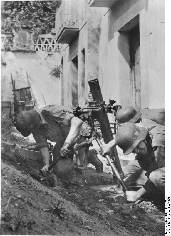 Schwere Granatwerfer im Einsatz an der süditalienischen Front Mitten im Hof eines Wohnhauses ist dieser deutsche Granatwerfer in Stellung gegangen und schickt von hier aus seine vom Feind gefürchteten Geschosse gegen die anglo-amerikanischen Linien. In dem engen Hof verdoppelt sich die die Lautstärke des Knalls, mit dem die Granate das Rohr verlässt. PK-Aufnahme Kriegsberichter Dohm, Scherl 28.9.43 [Herausgabedatum]